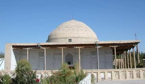 Комплекс Халифа Худойдода